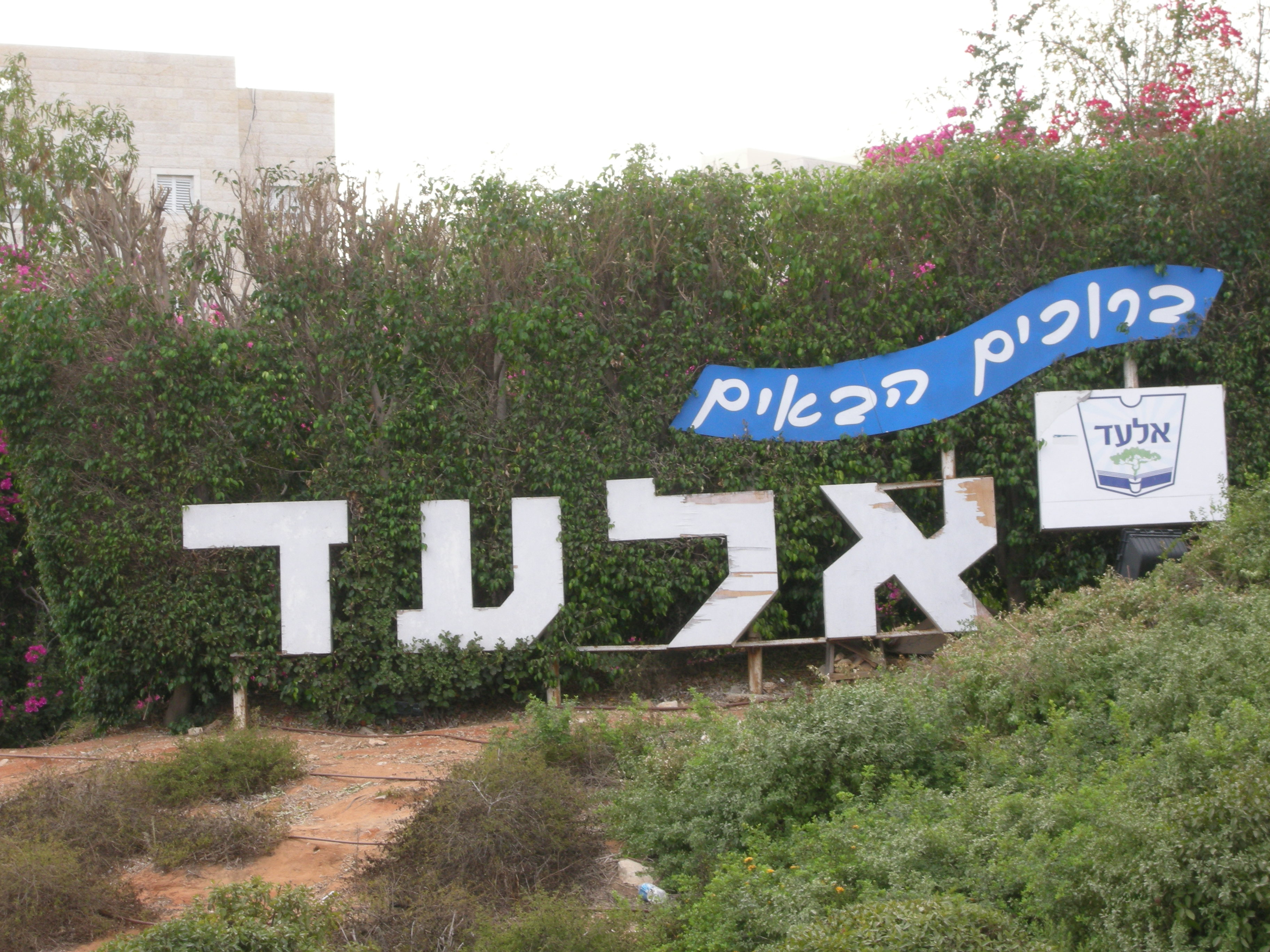 Israeli National trail